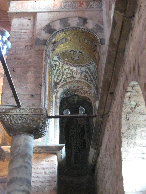 Pammakaristos Church